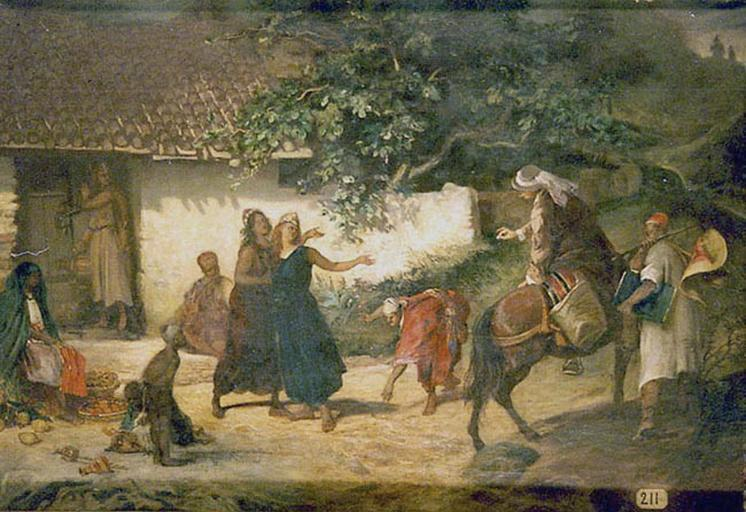 Le départ de l'artiste, scène d'Egypte.